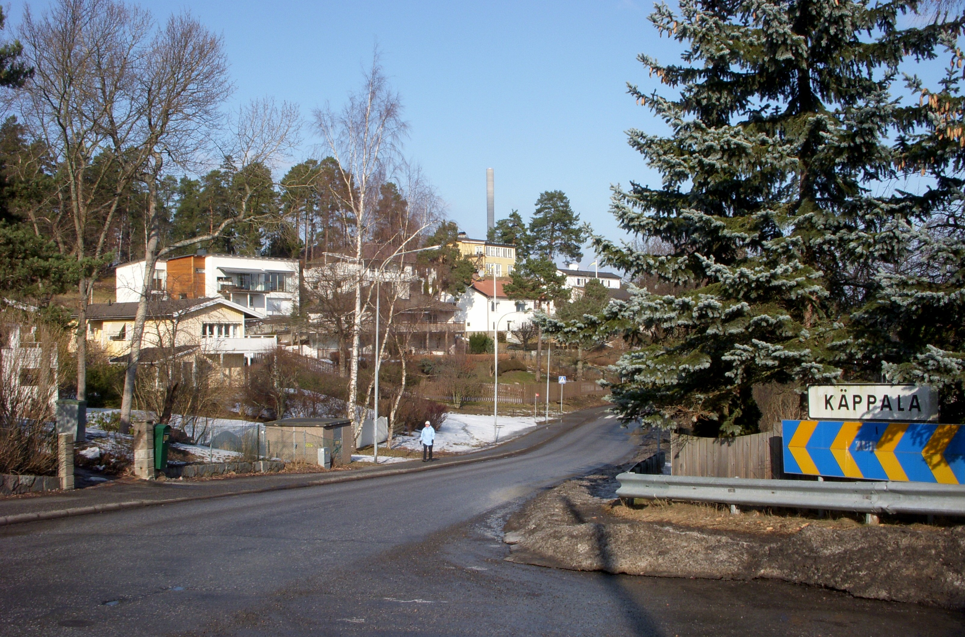 Stadsdeln Käppela på Lidingö